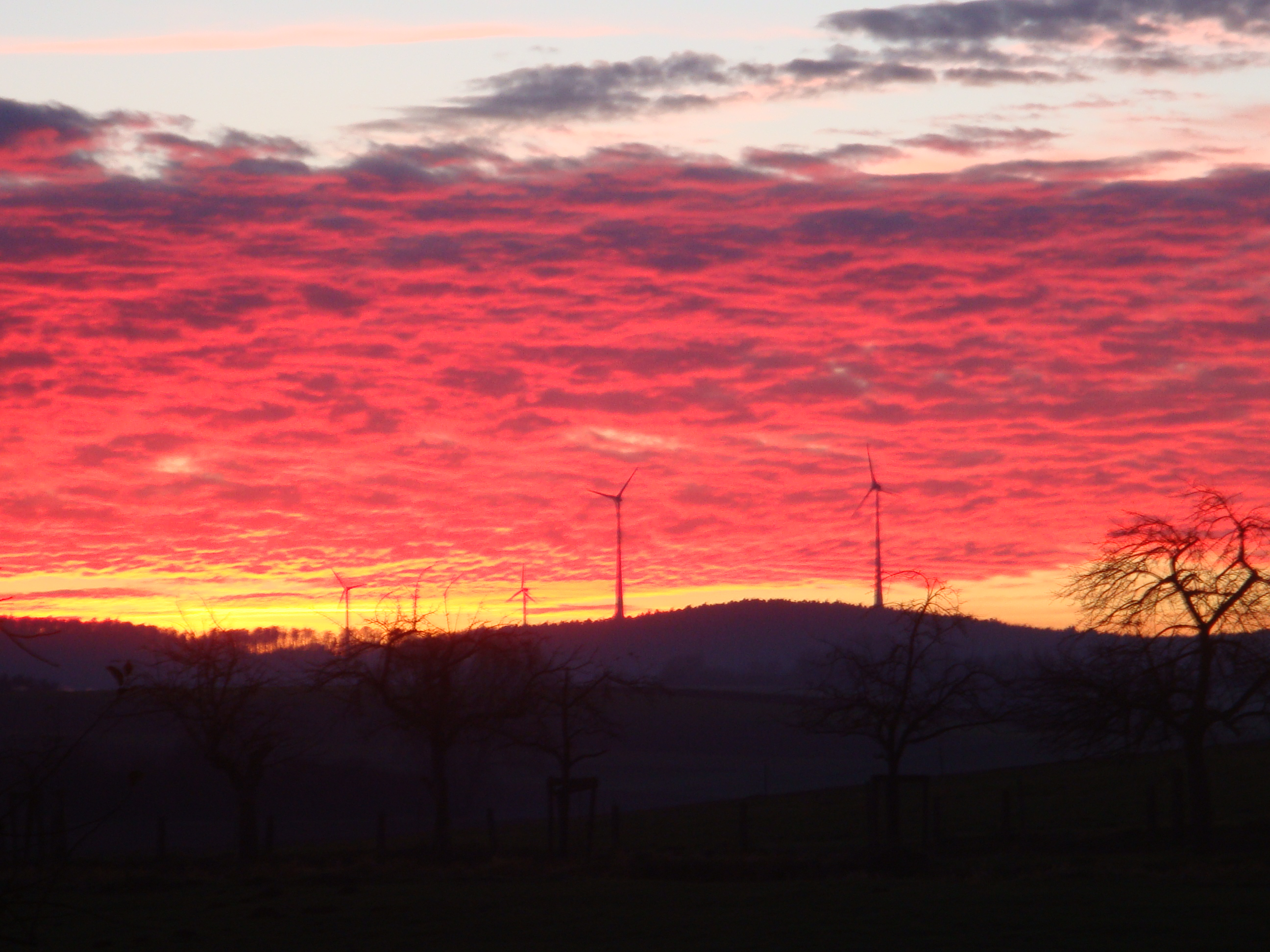 Wind turbines at Binselberg wind farm, sunset